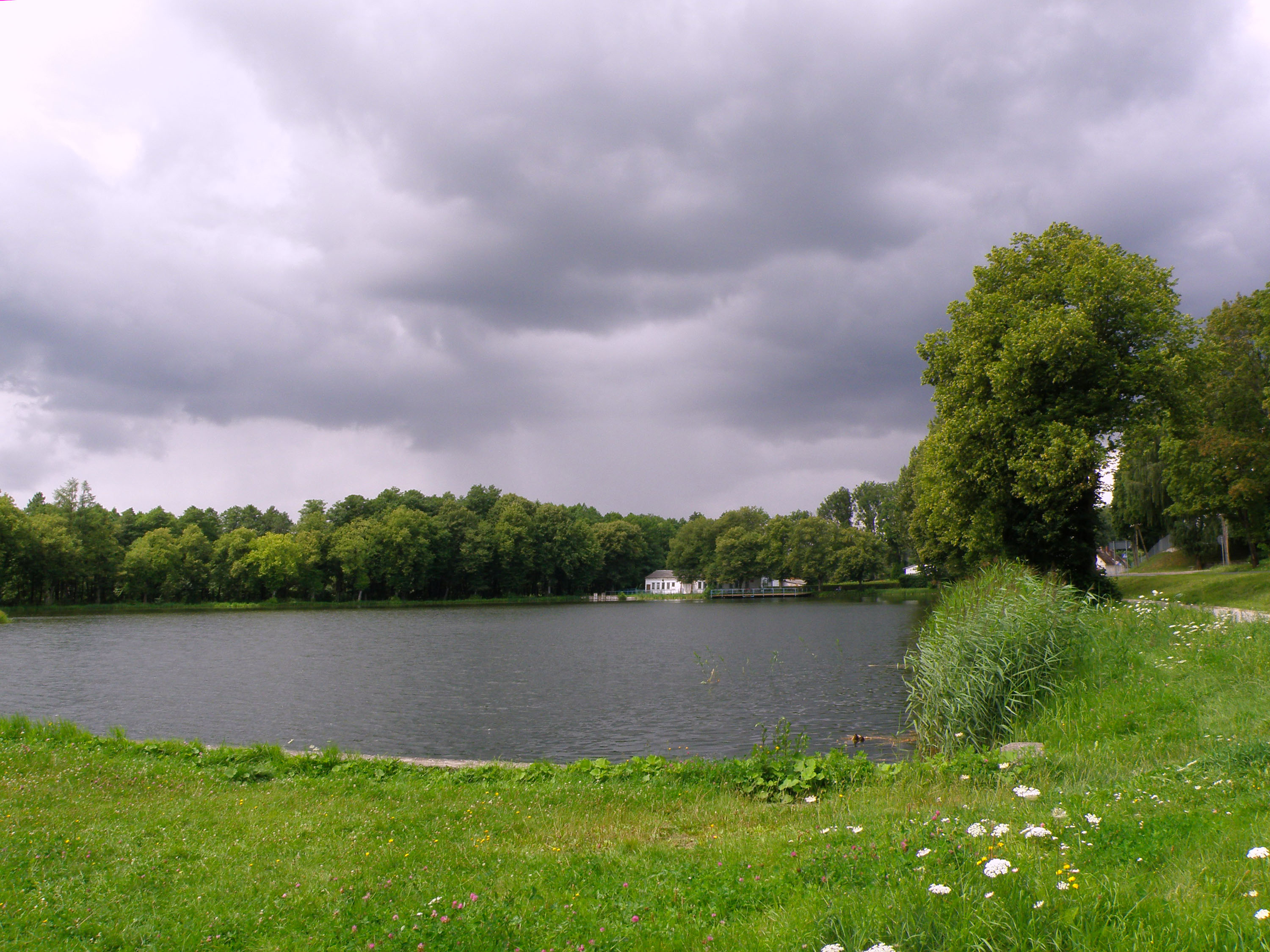 Polanów, woj. zachodniopomorskie, pow. koszaliński, gmina Polanów, ul. Wolności, punkt czerpania wody